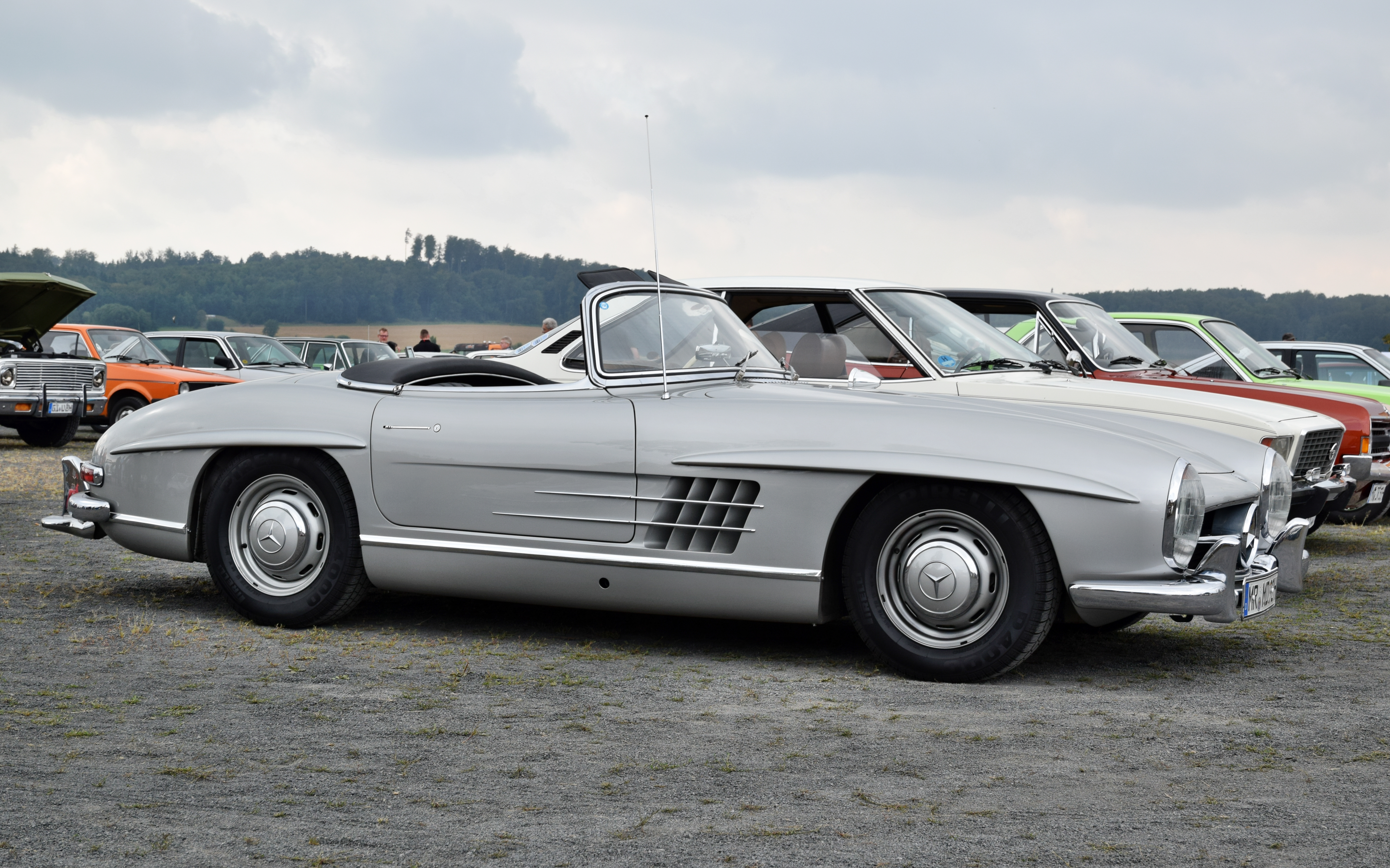 Mercedes 300 SL Roadster auf dem 5. "Werk II Old- und Youngtimertreffen" (2016) in Dreihausen